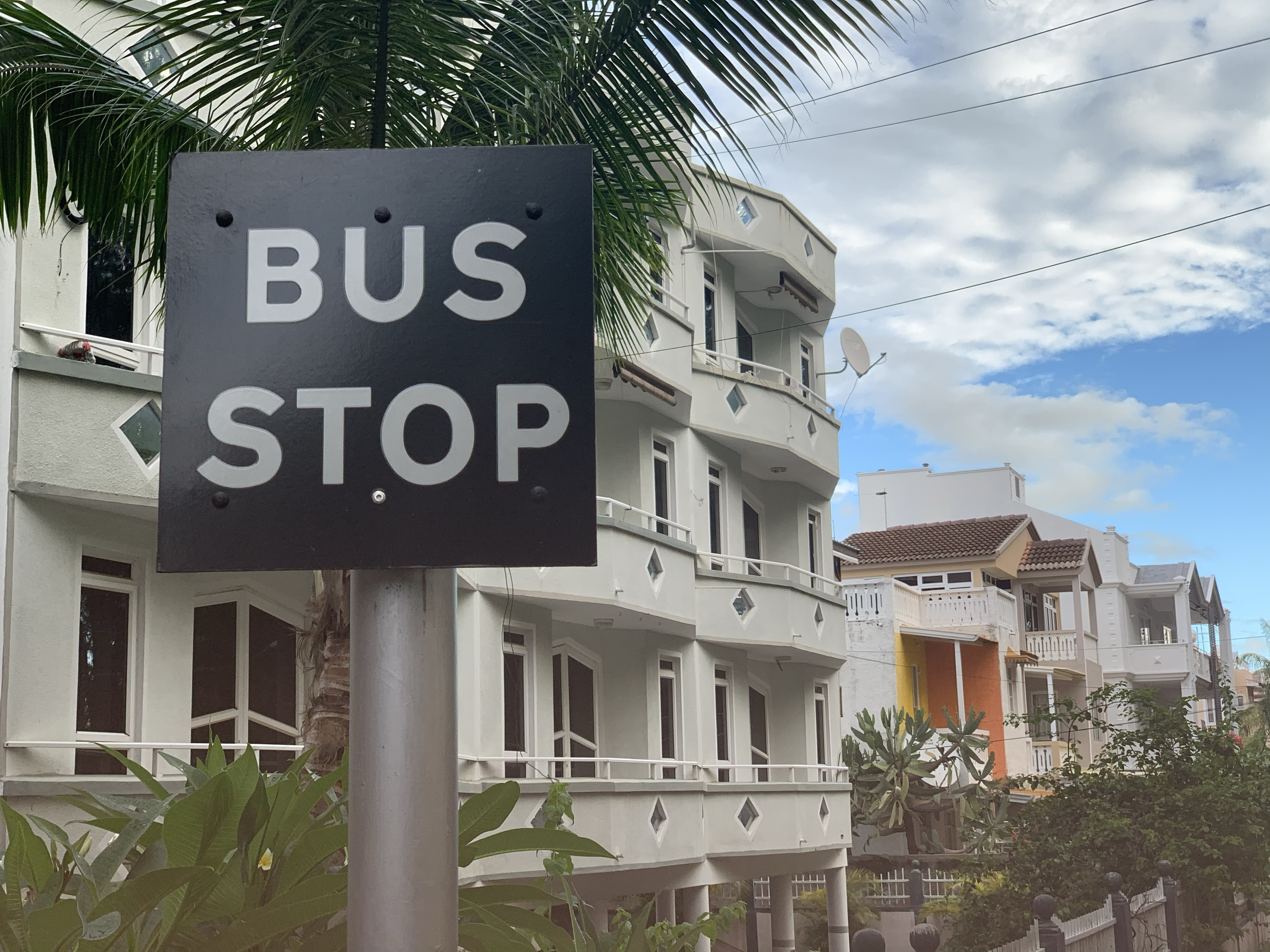 Un arrêt de bus à Flic-en-Flac (février 2020).